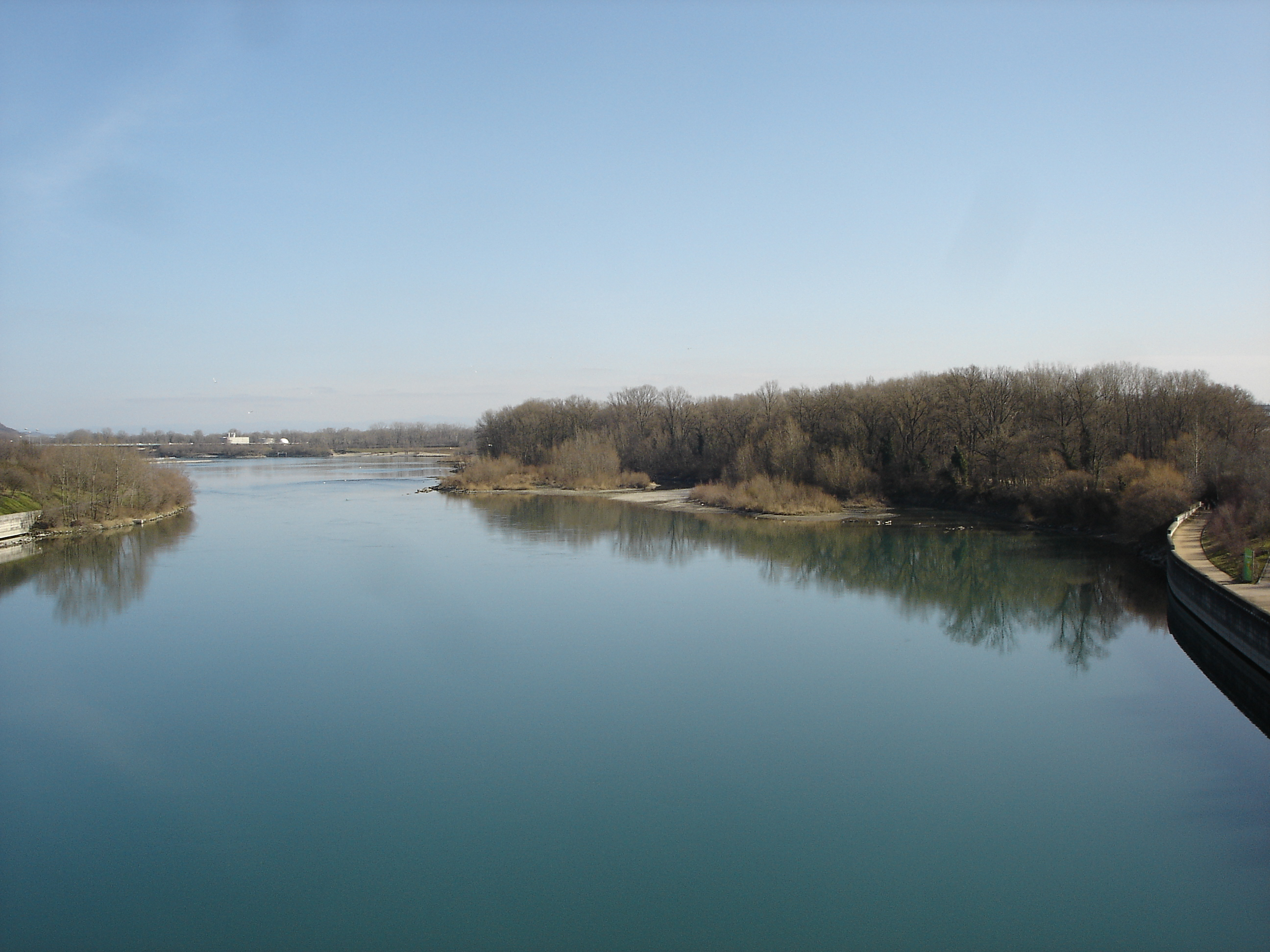 Vue sur le Rhône et la parc de la Feyssine depuis le pont Raymond Poincaré.